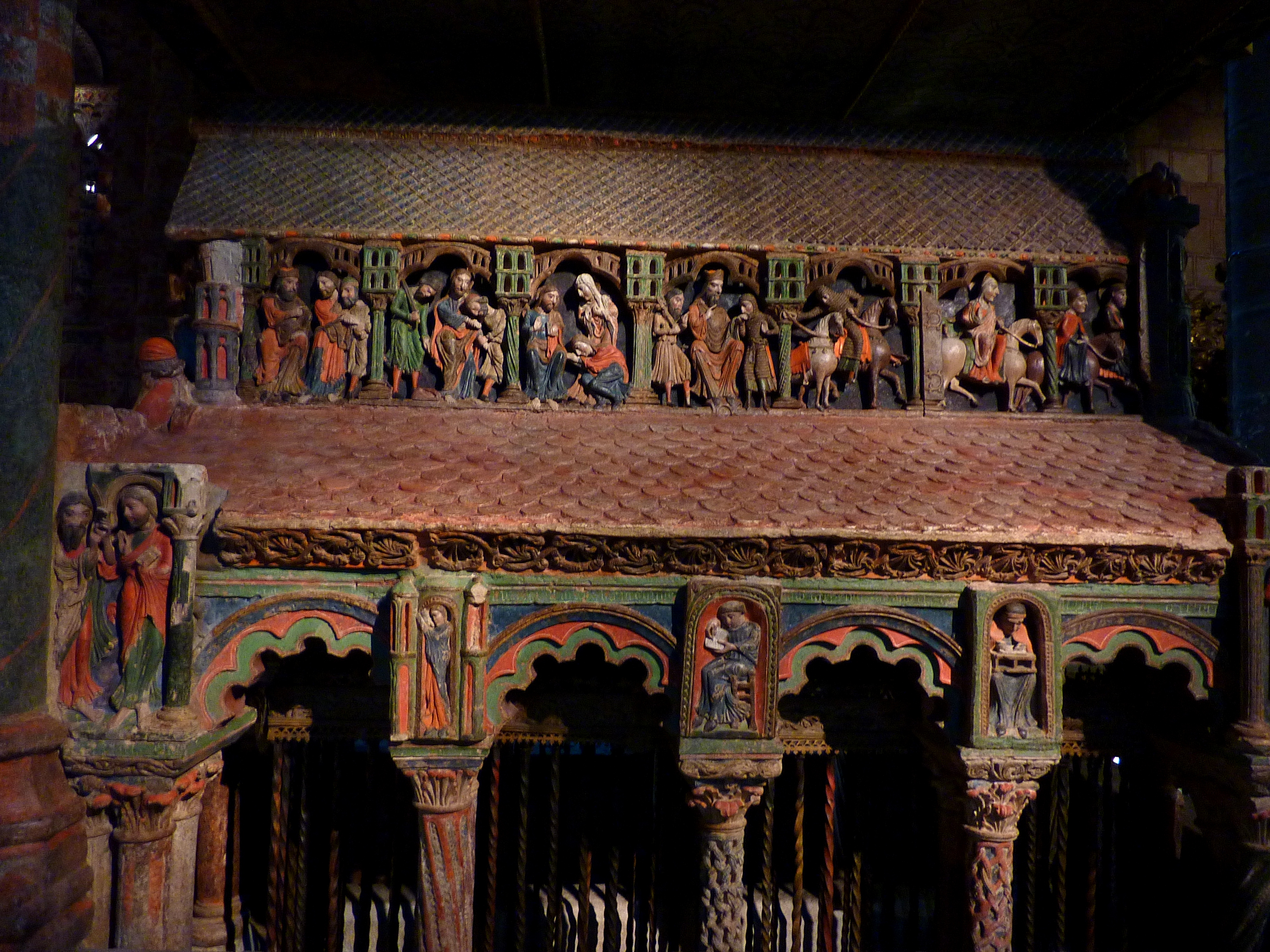 Sepulcro de los Santos Hermanos Mártires en la basílica de San Vicente (Ávila).